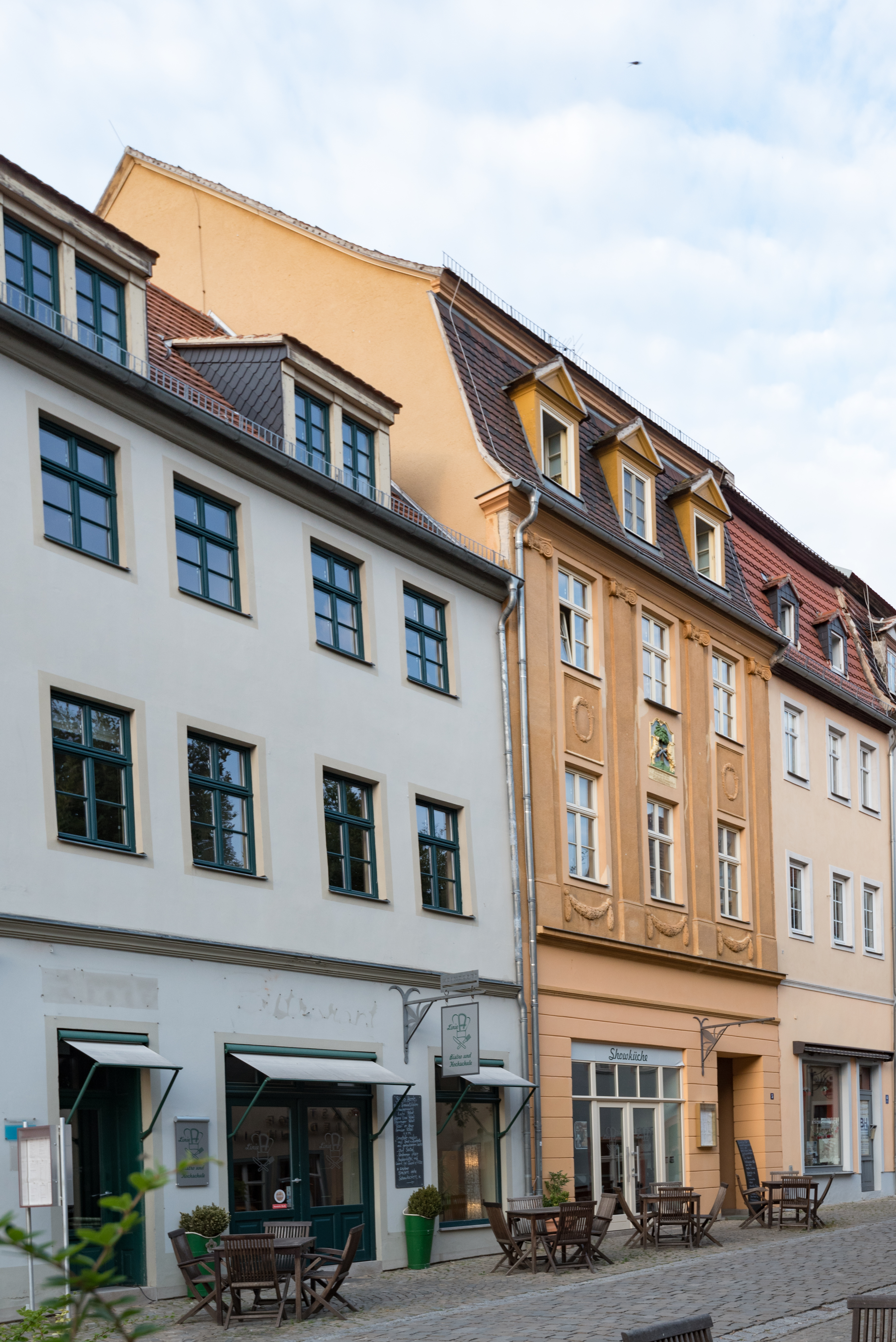 Naumburg (Saale), Steinweg 5